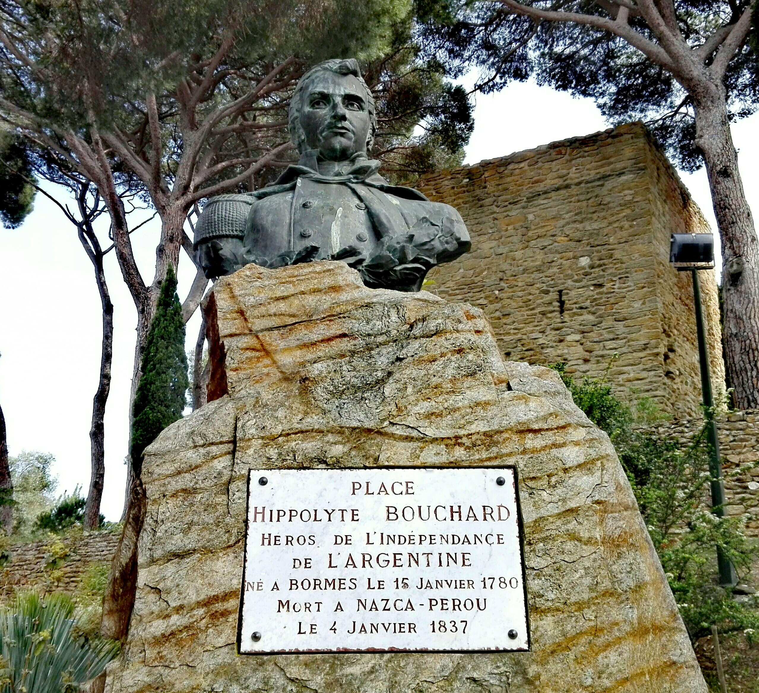 Photo du buste et de la plaque commémorative de la place Hippolyte de Bouchard à Bormes-les-Mimosas.